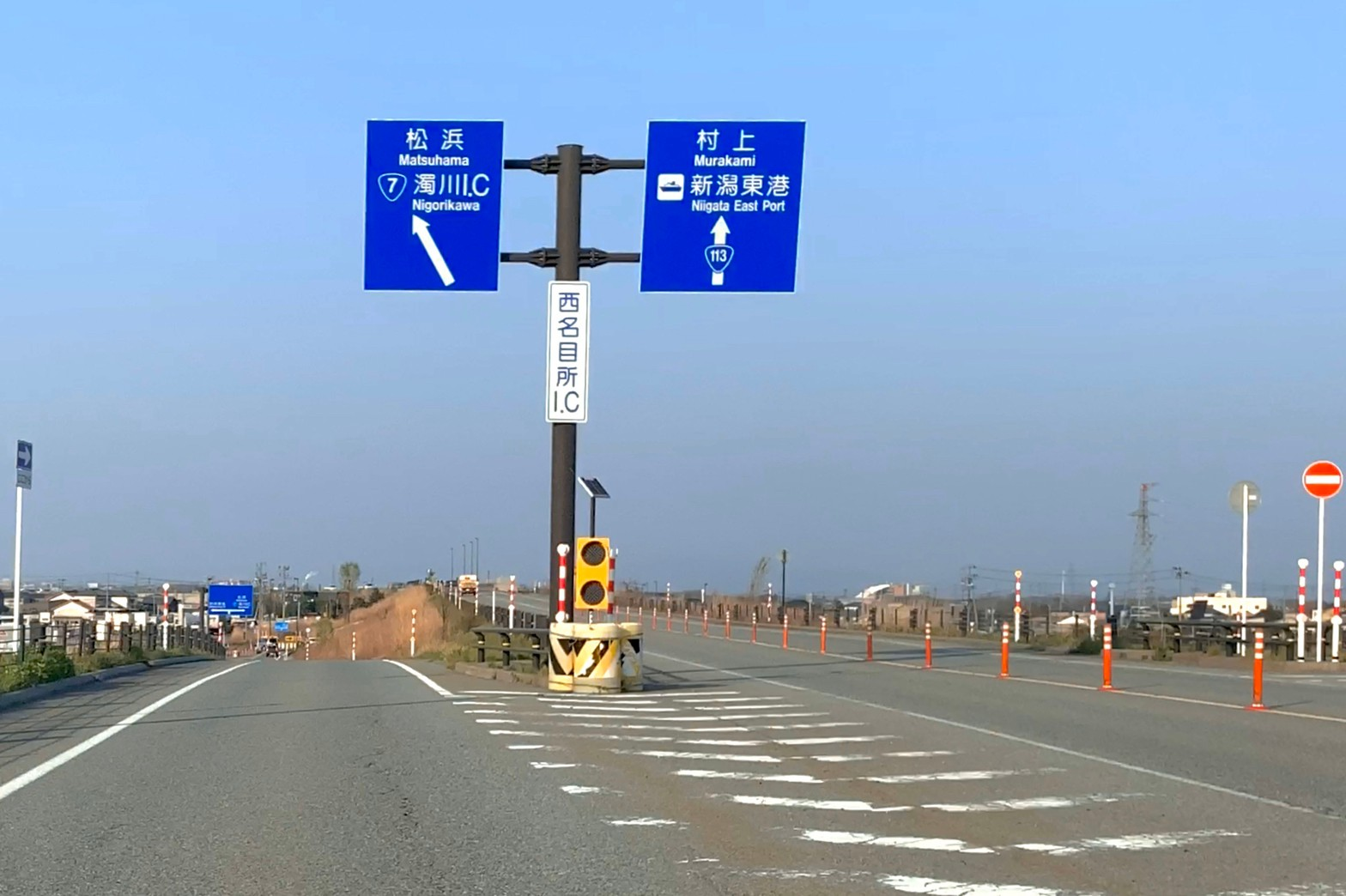 国道113号 ござれや阿賀橋 西名目所IC（新潟市北区，2020年4月）